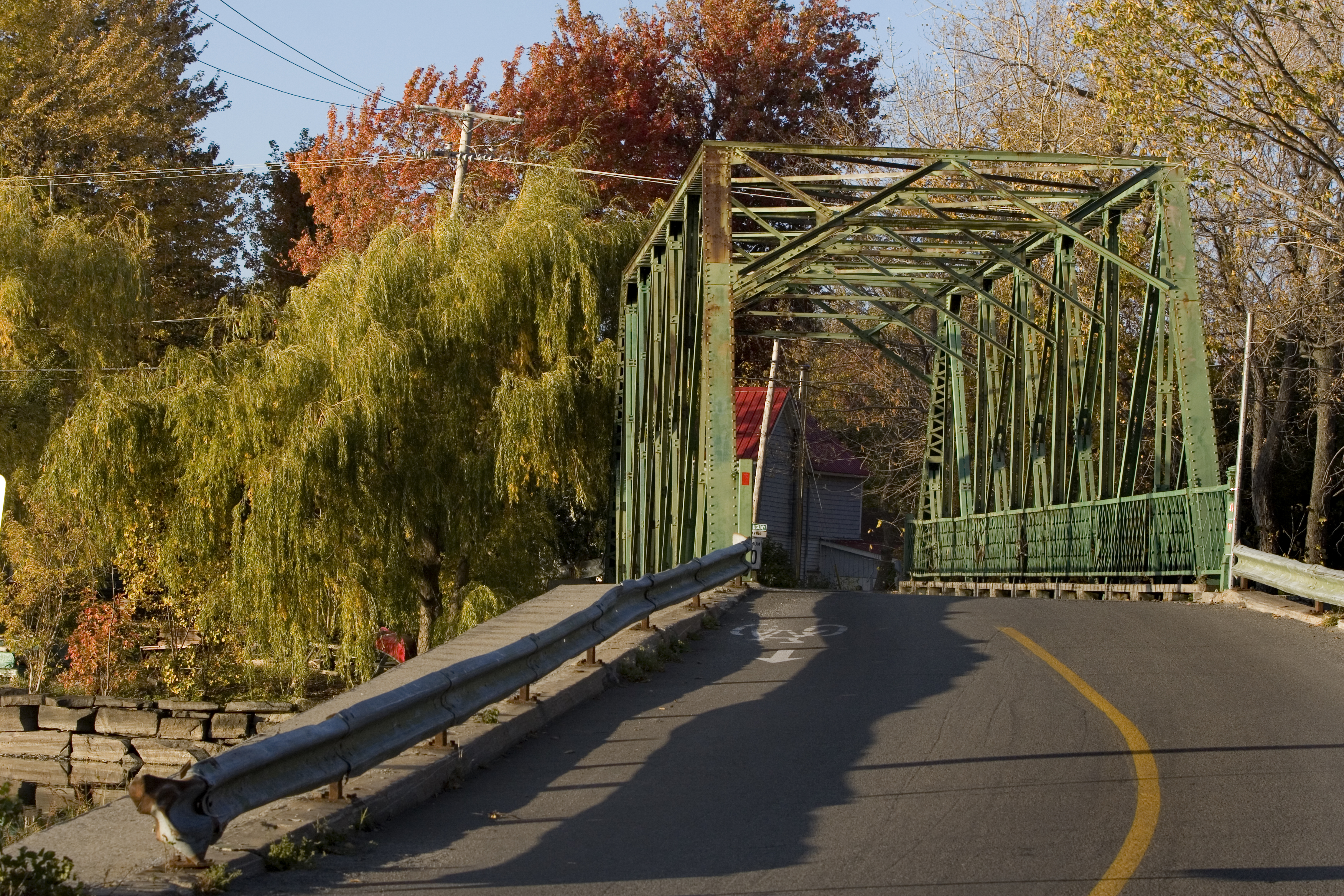 Chemin du lac St-Louis, Lery : Petit pont métallique reliant Ville de Léry et Châteauguay